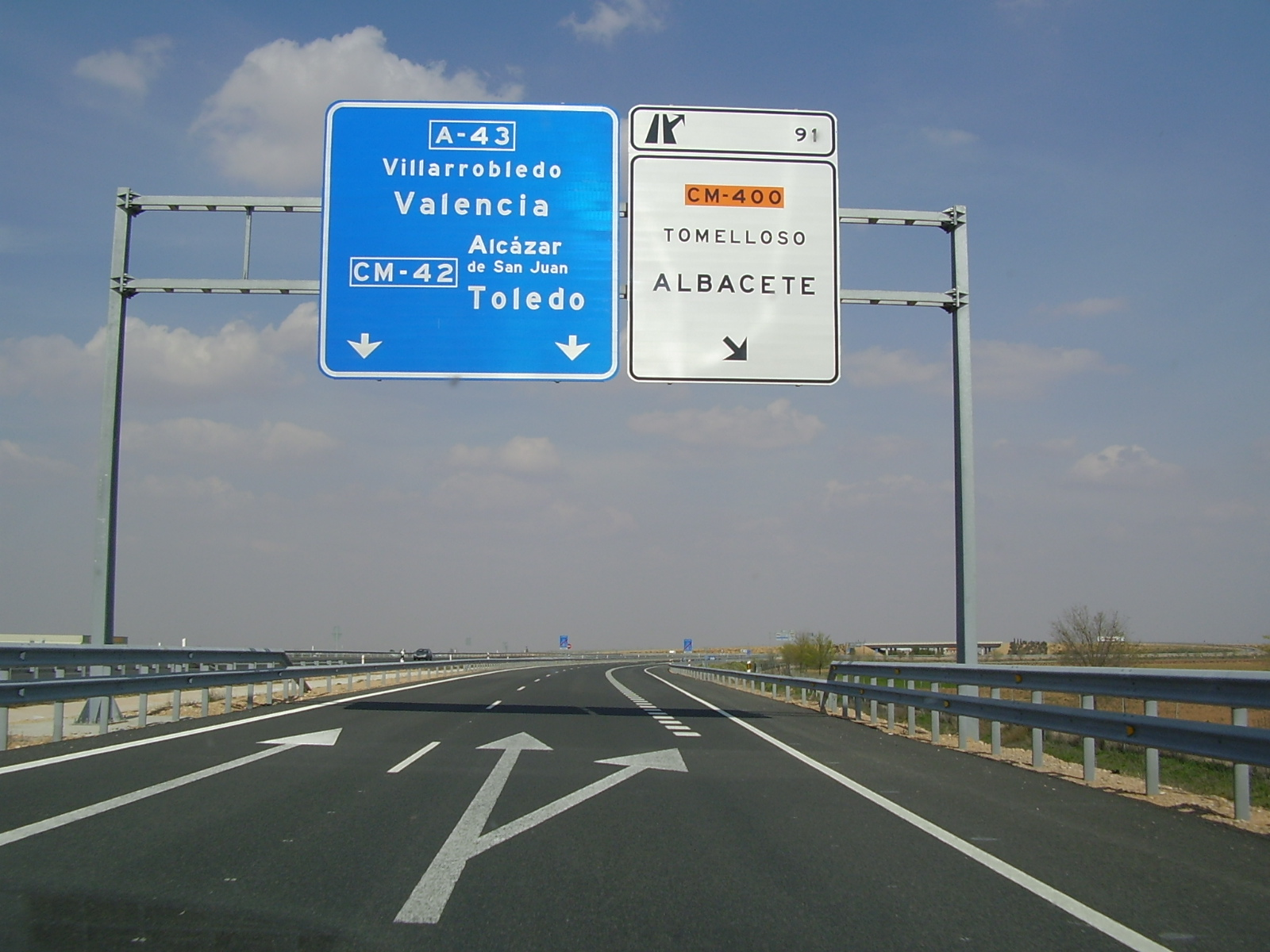 Imagen de la autovia A-43 a su paso por Tomelloso.